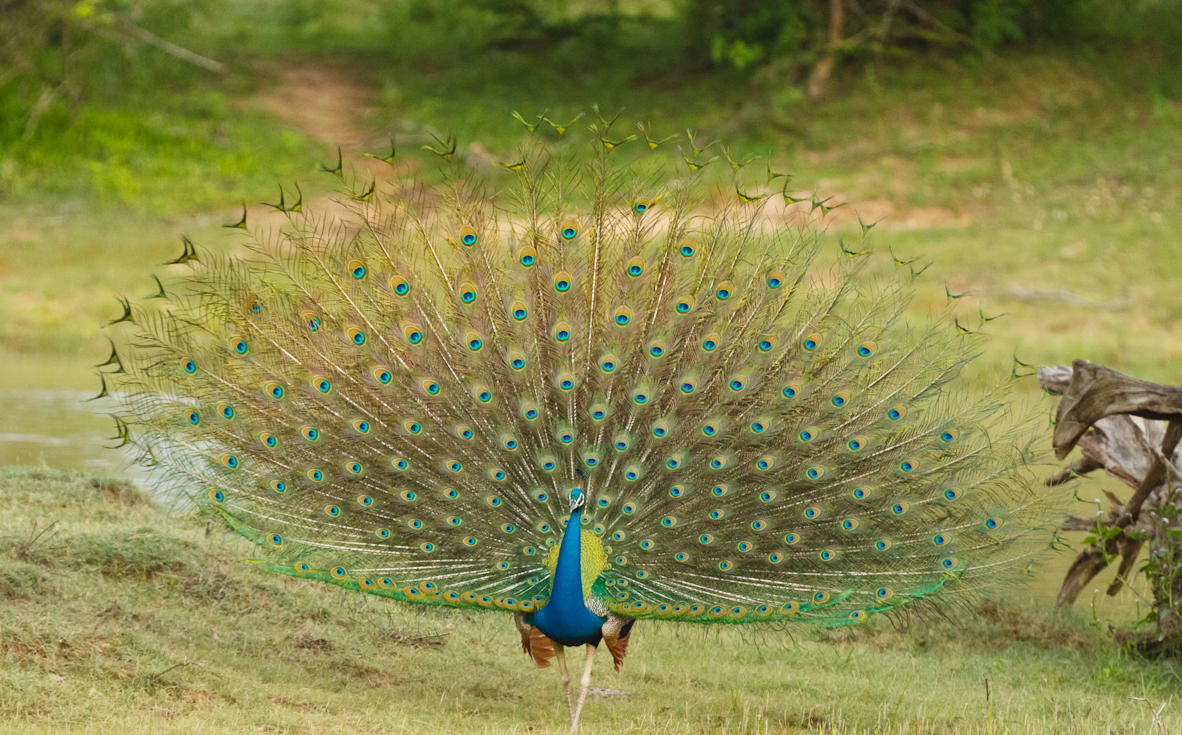 Pavo cristatus male displaying, Yala National Park, Sri Lanka